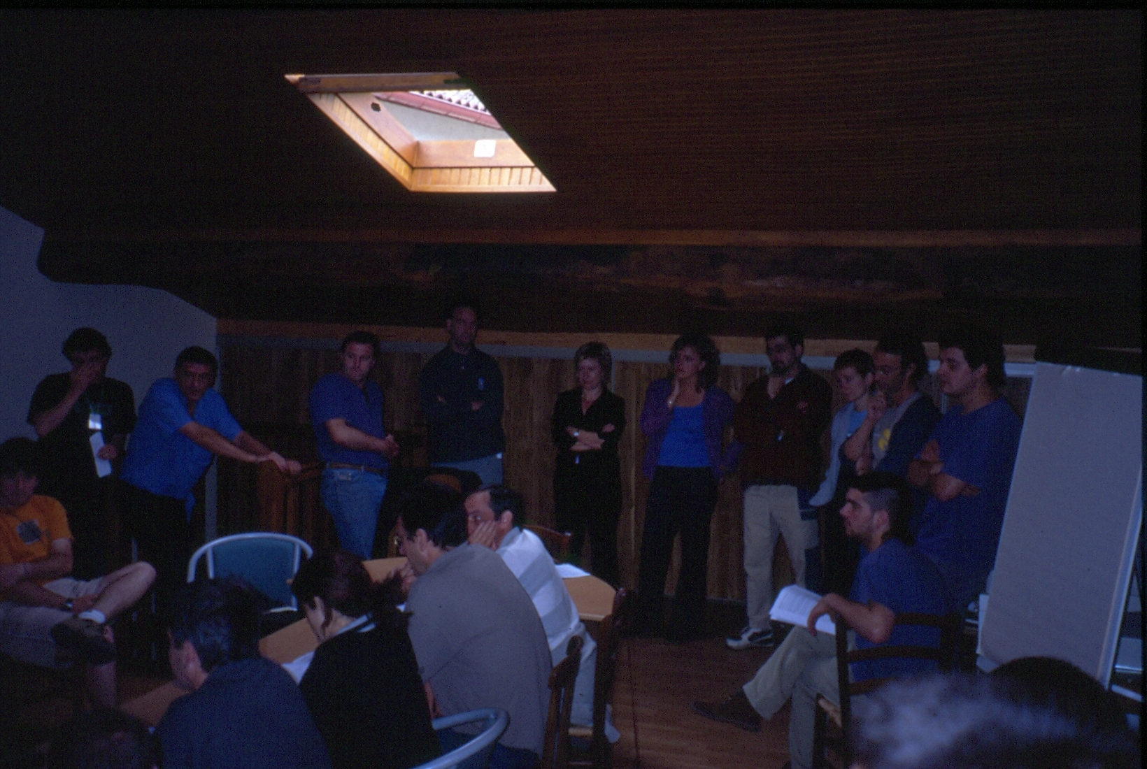 Prentsaurrekoan. Tas-Tas, Xorroxin, Beleixe, Molotoff, Irulegi, Eguzki, Euskalerria, Txapa, Matrallako, Loiola Gure... irratietako kideak.